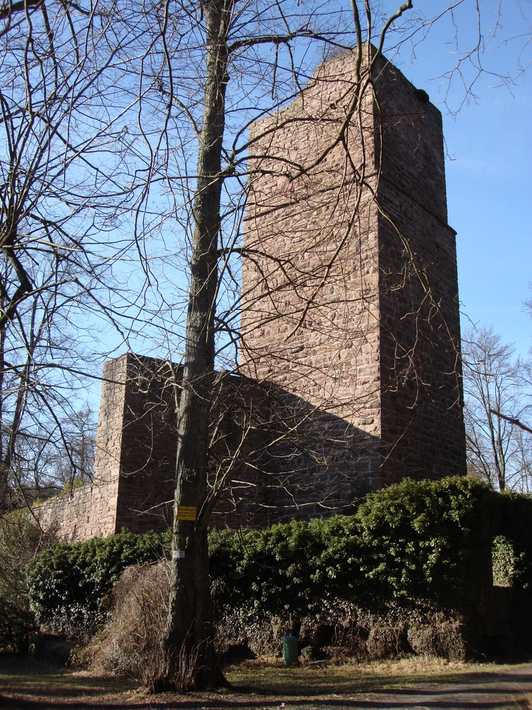 Burgruine Liebeneck - Bergfried